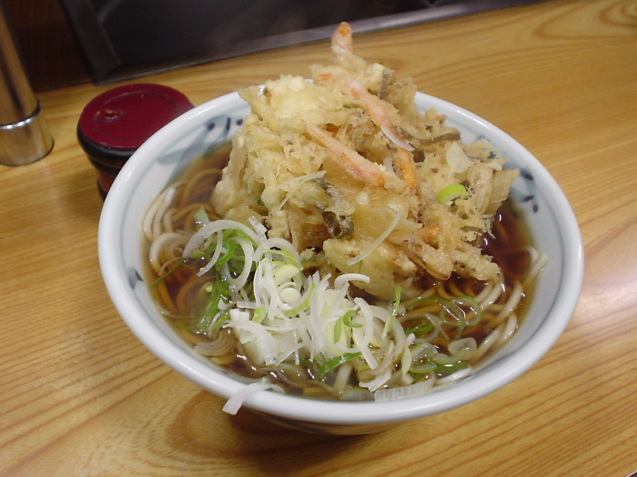 初台立食い蕎麦屋